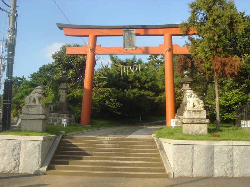 稲毛浅間神社鳥居